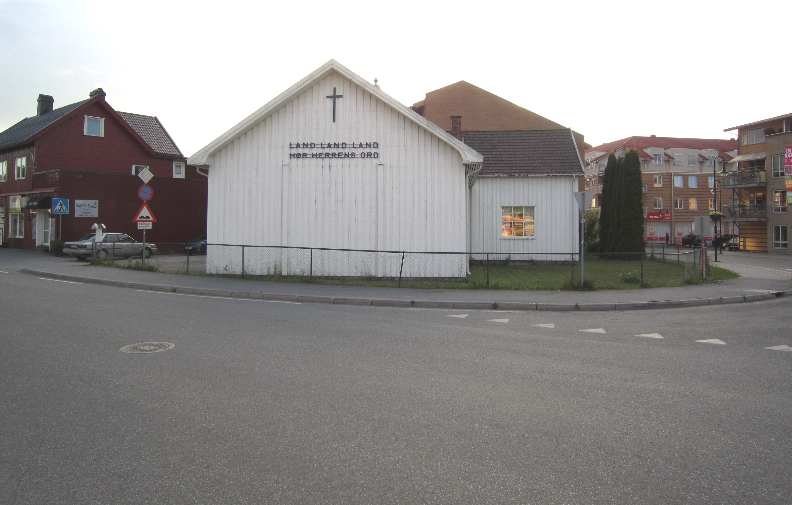 Drammensveien (fylkesvei 53) passerer Mjøndalen bedehus.